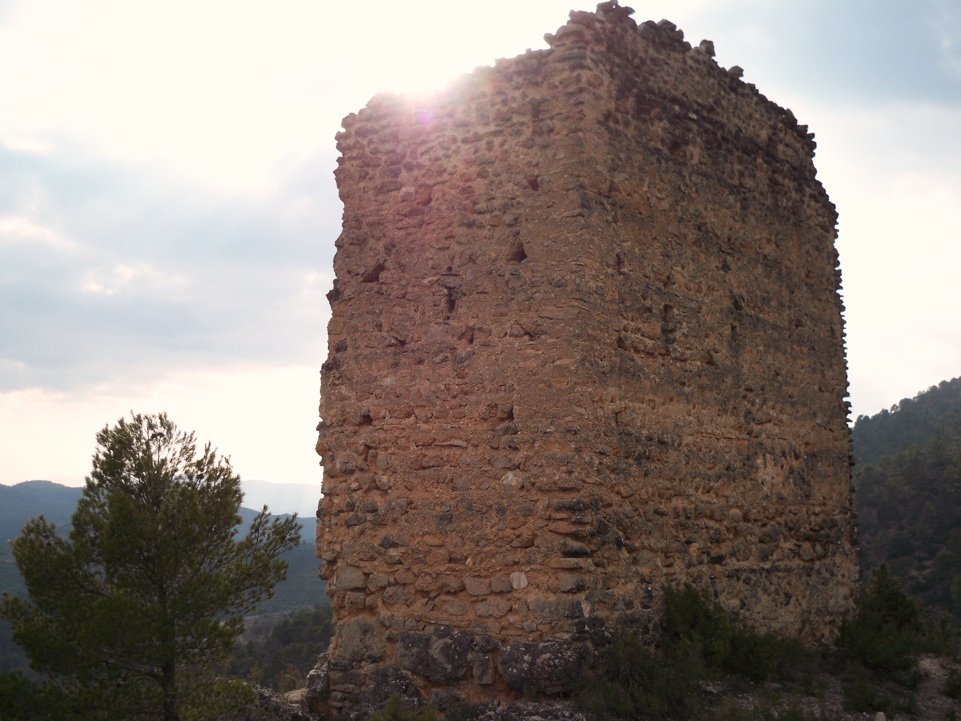 Fotografía de la atalaya de Torre - Pedro (Molinicos - Albacete).